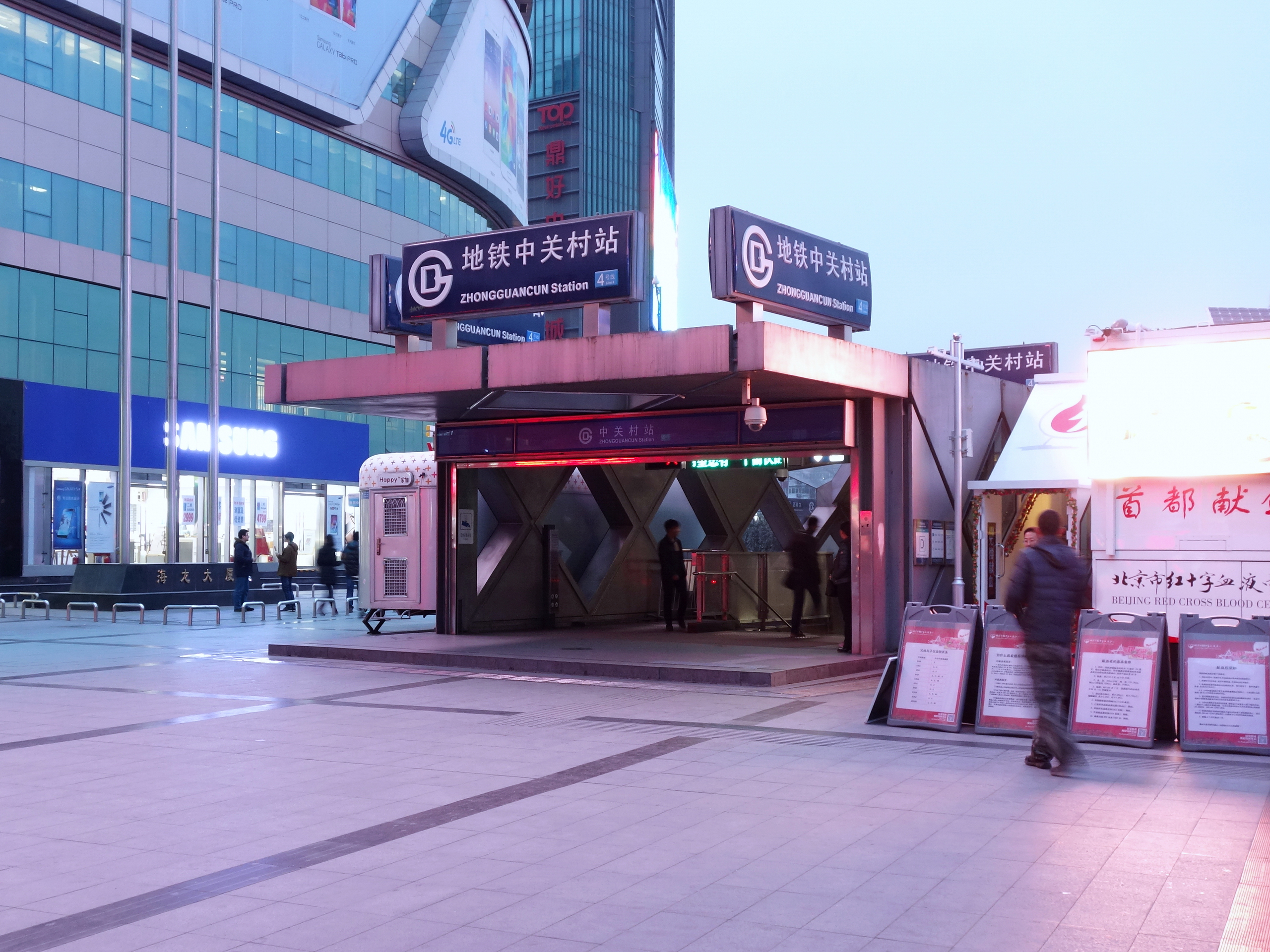 北京地铁4号线中关村站D出口